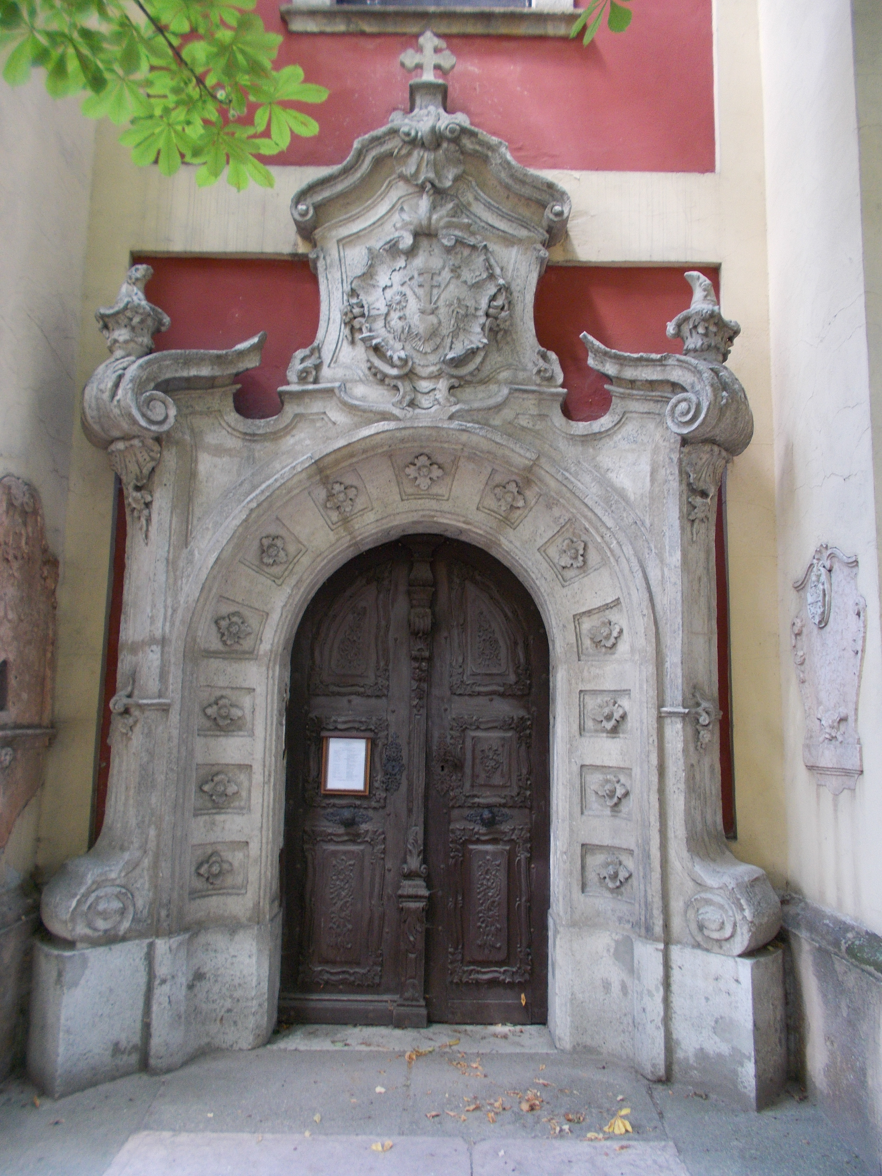 Belgrád templom. Görögkeleti püspöki székesegyház. Műemlék ID 7388 Nyugati kapu. - Szentendre, Pátriárka utca This is a photo of a monument in Hungary. Identifier: 7388